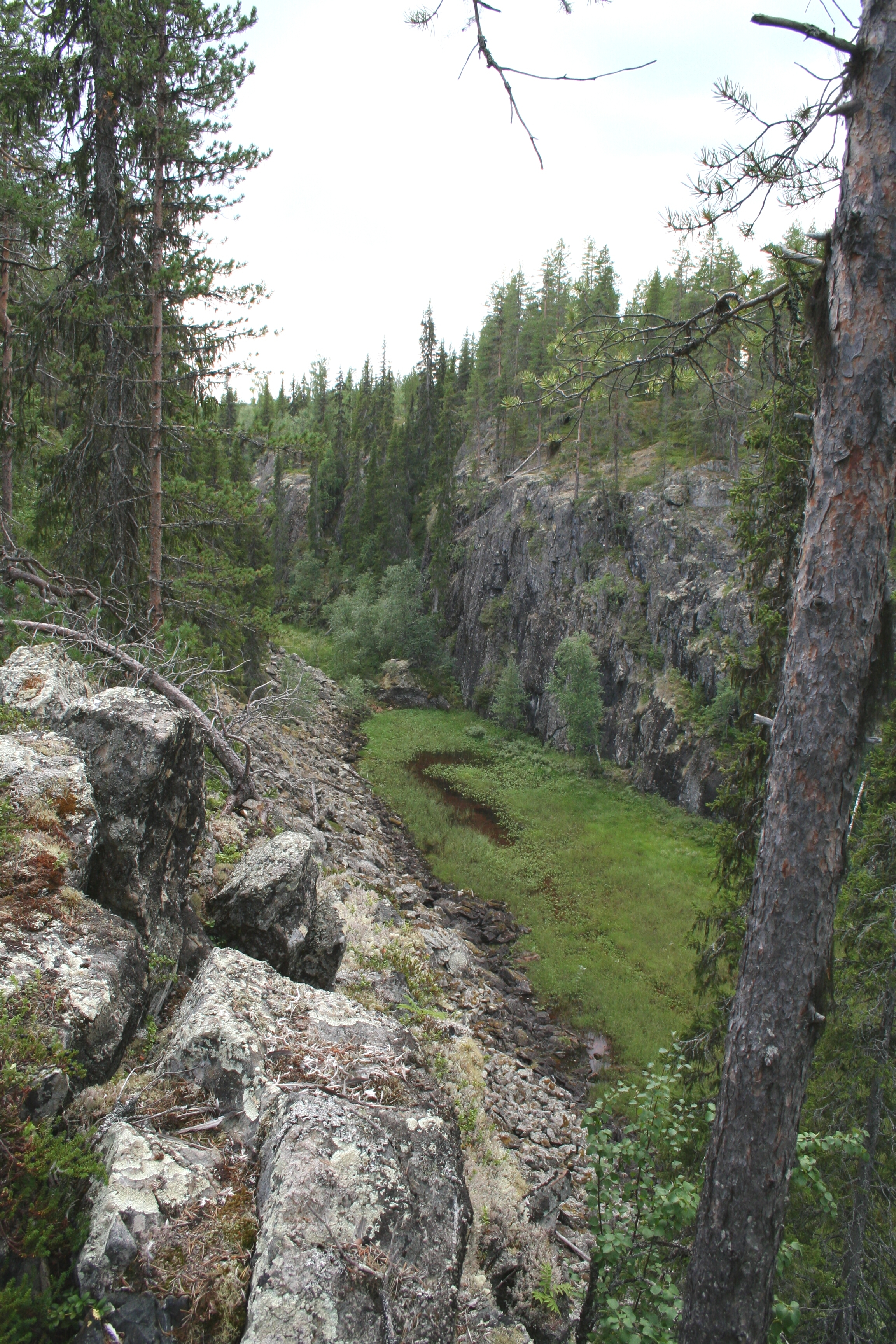 Naturschutzgebiet Gimegoults in Schweden